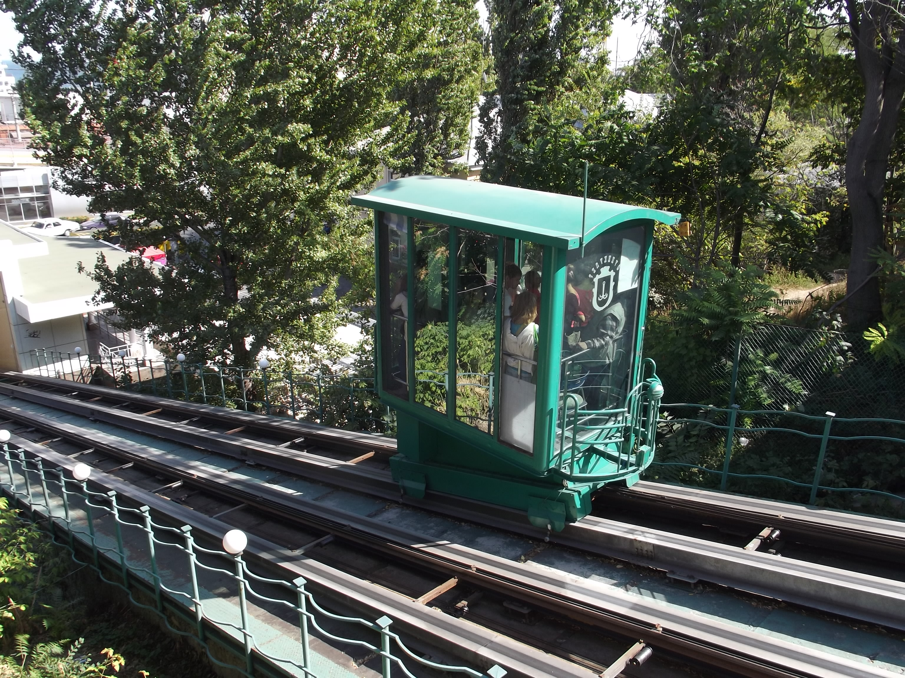 Одесский фуникулёр